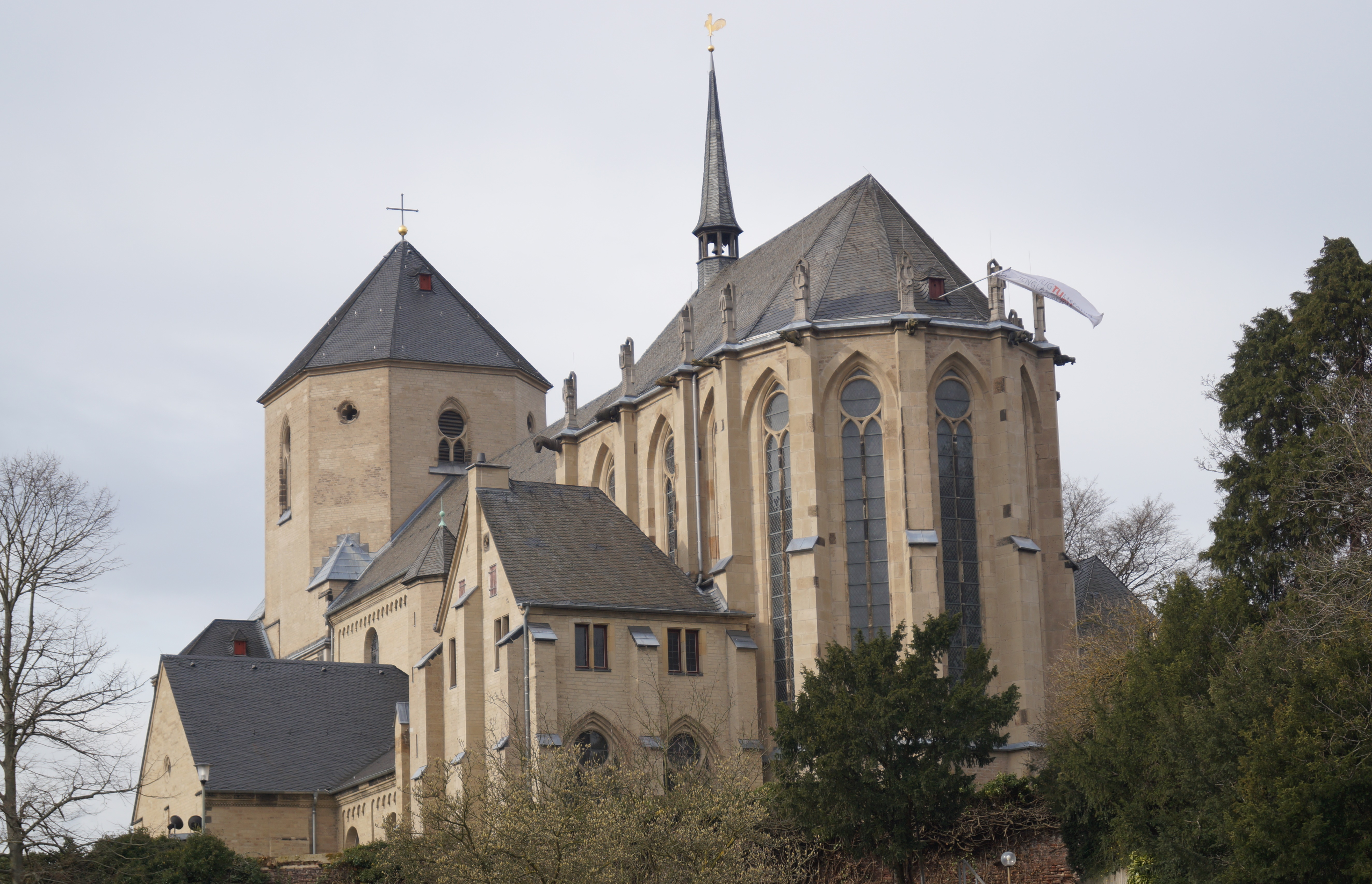 Mönchengladbacher Münster St. Vitus